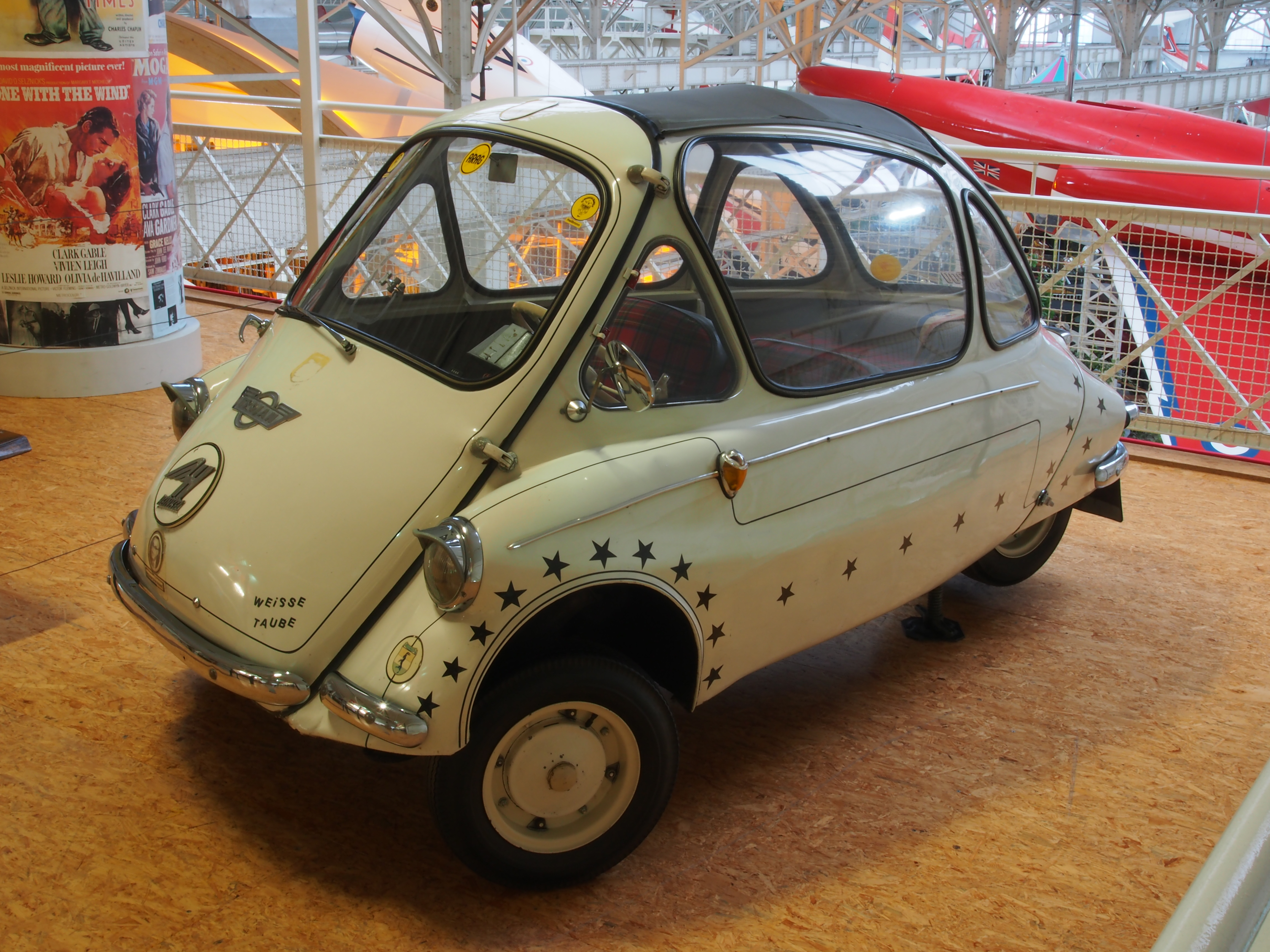 1956 Heinkel Kabinenroller Trojan